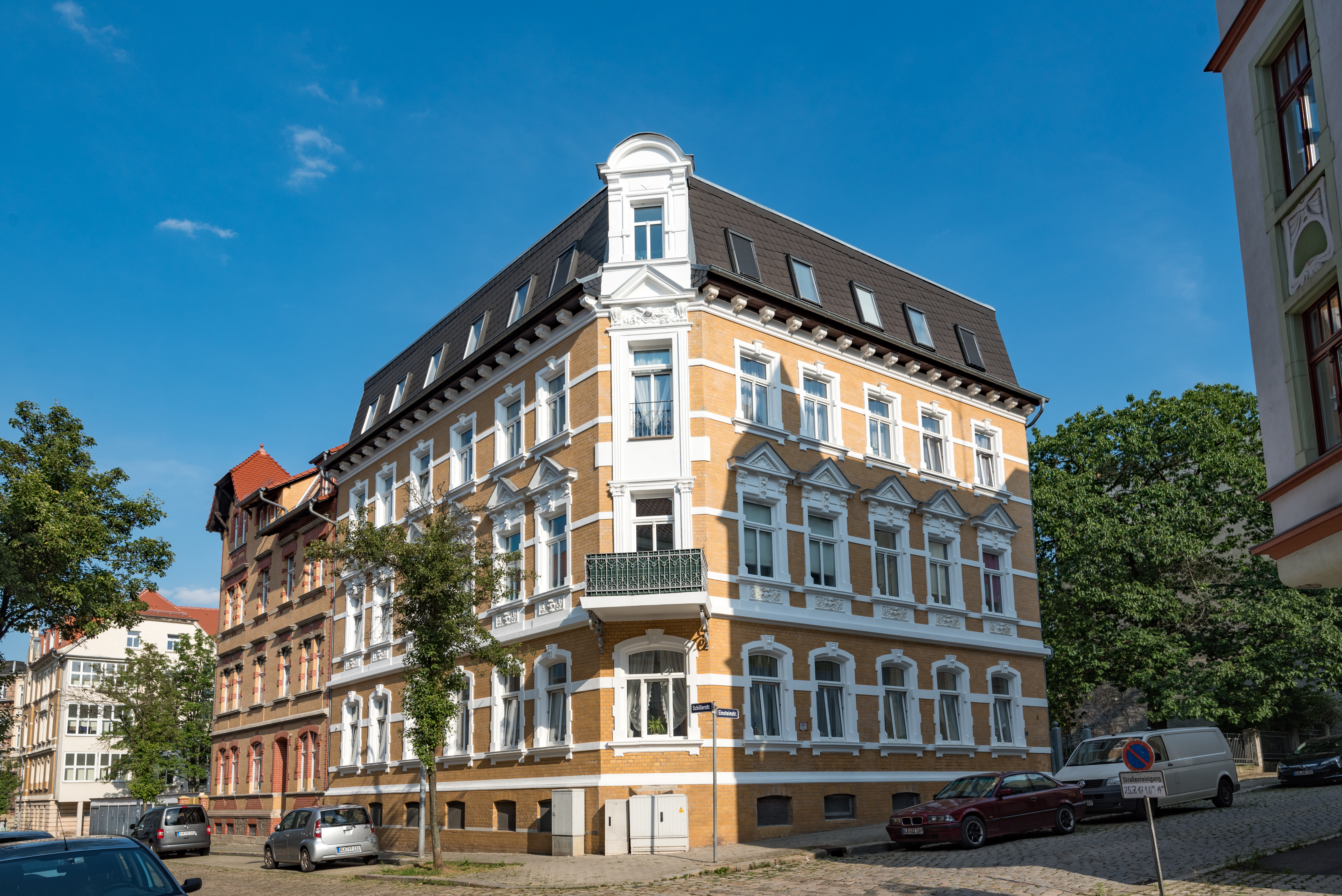 Zeitz, Einsteinstraße 5